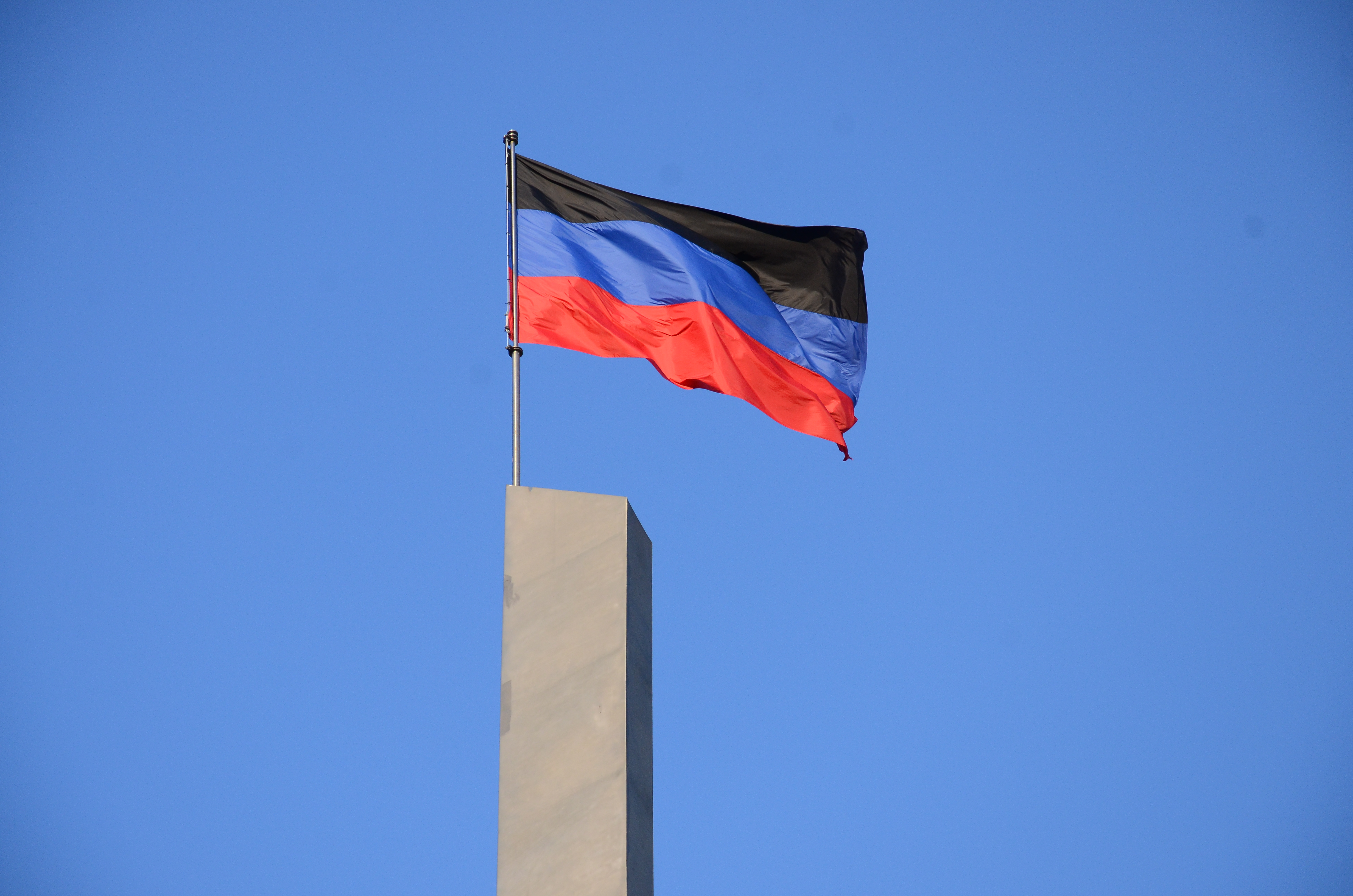 Репетиция парада в честь дня Победы в Донецке